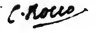 Autografo di Carlo Rocco